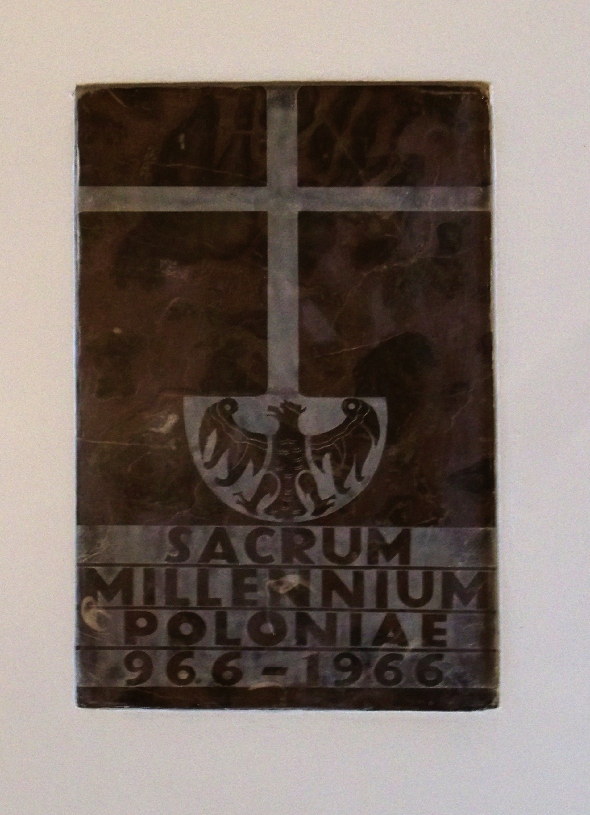 Kościół pw. Matki Boskiej Królowej Polski na warszawskim Marymoncie